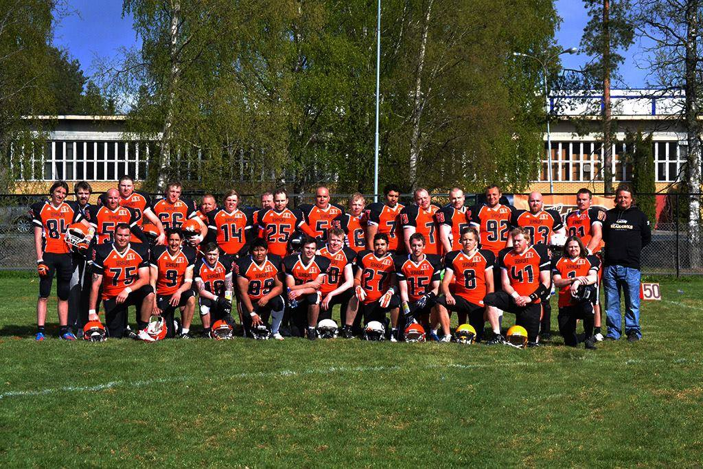 Åsanes Senior lag 2014